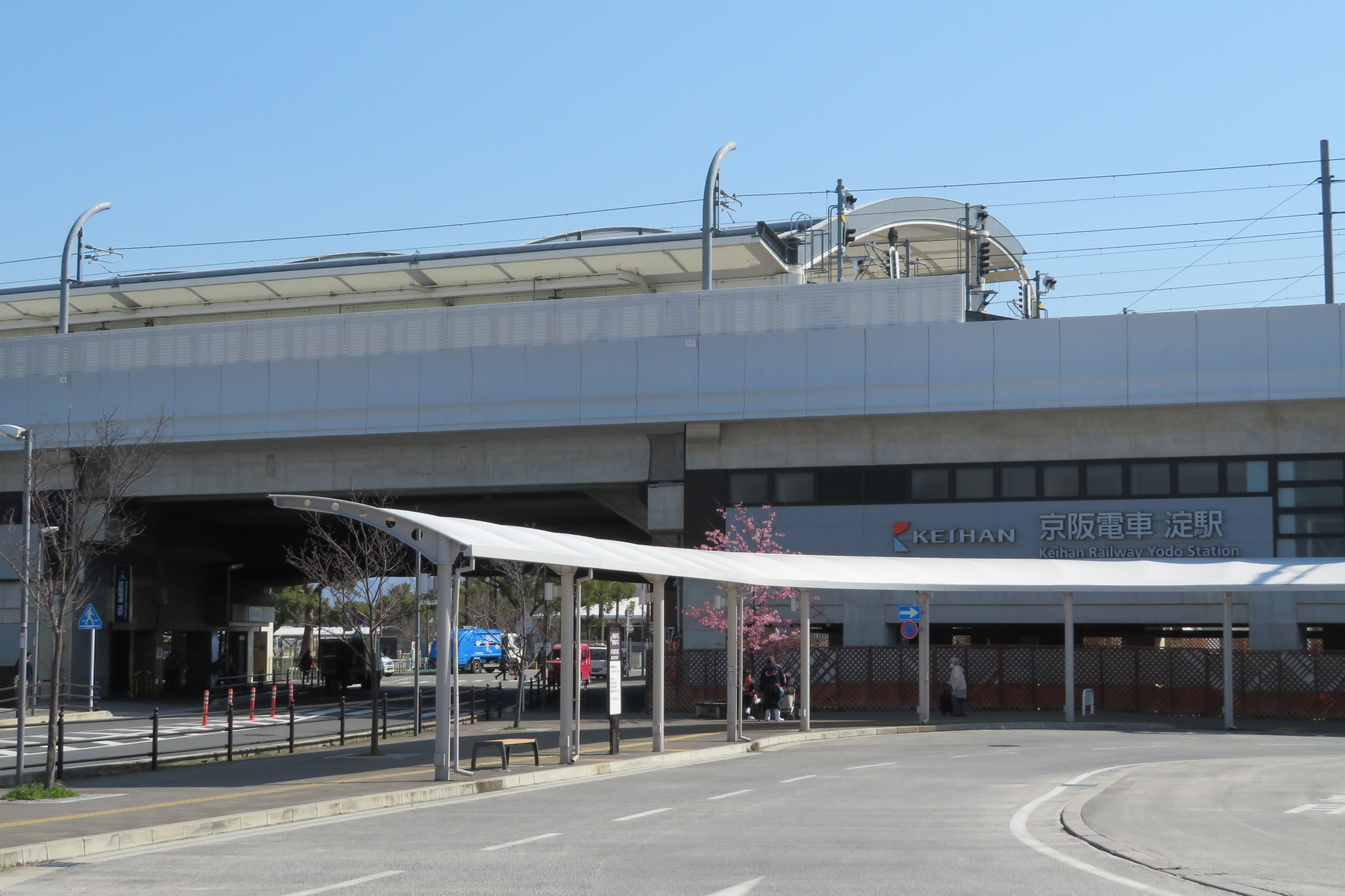 京阪電鉄淀駅中央改札口